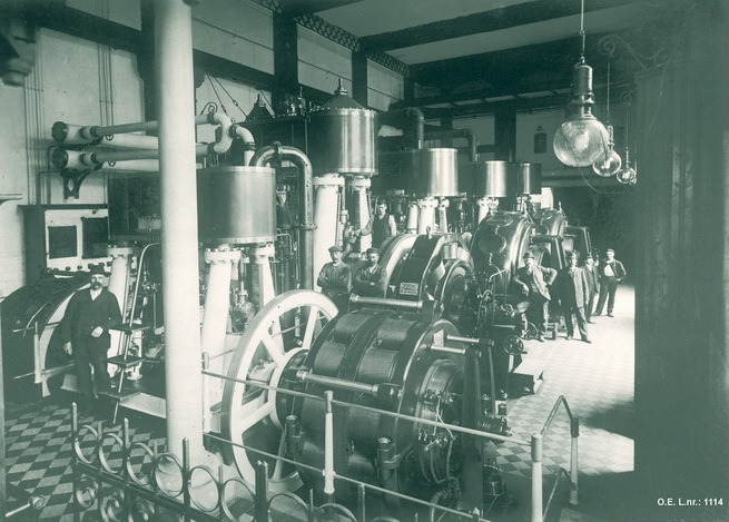 Arbeidere poserer i hallen til dampstasjonen. Oslo, Rosenkrantzgaten 14.